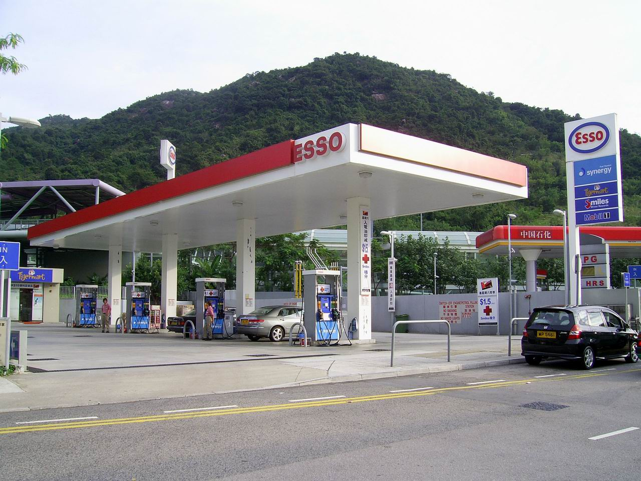 中文（香港）: 位於香港馬鞍山的「埃索」加油站